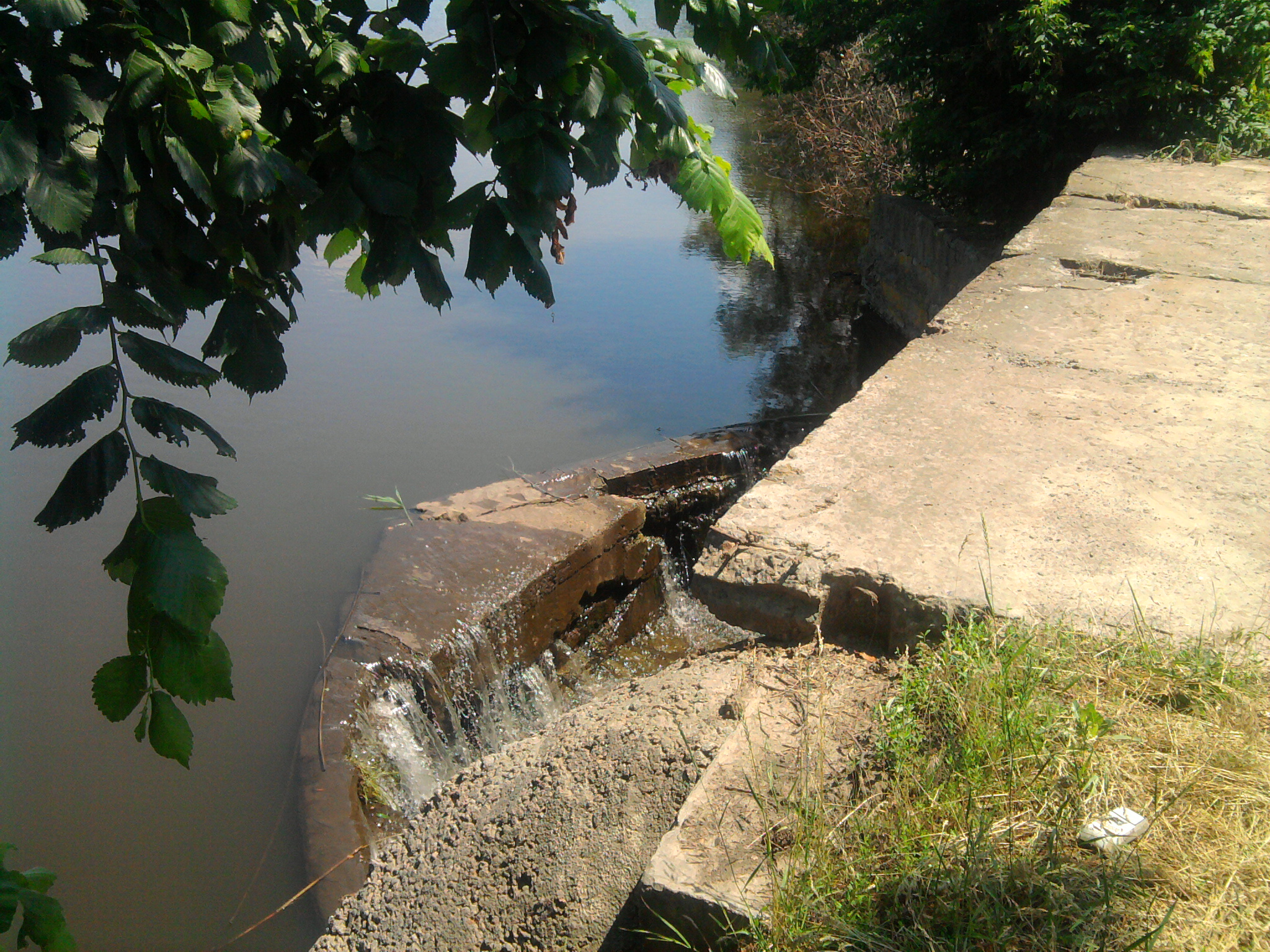 Водопад